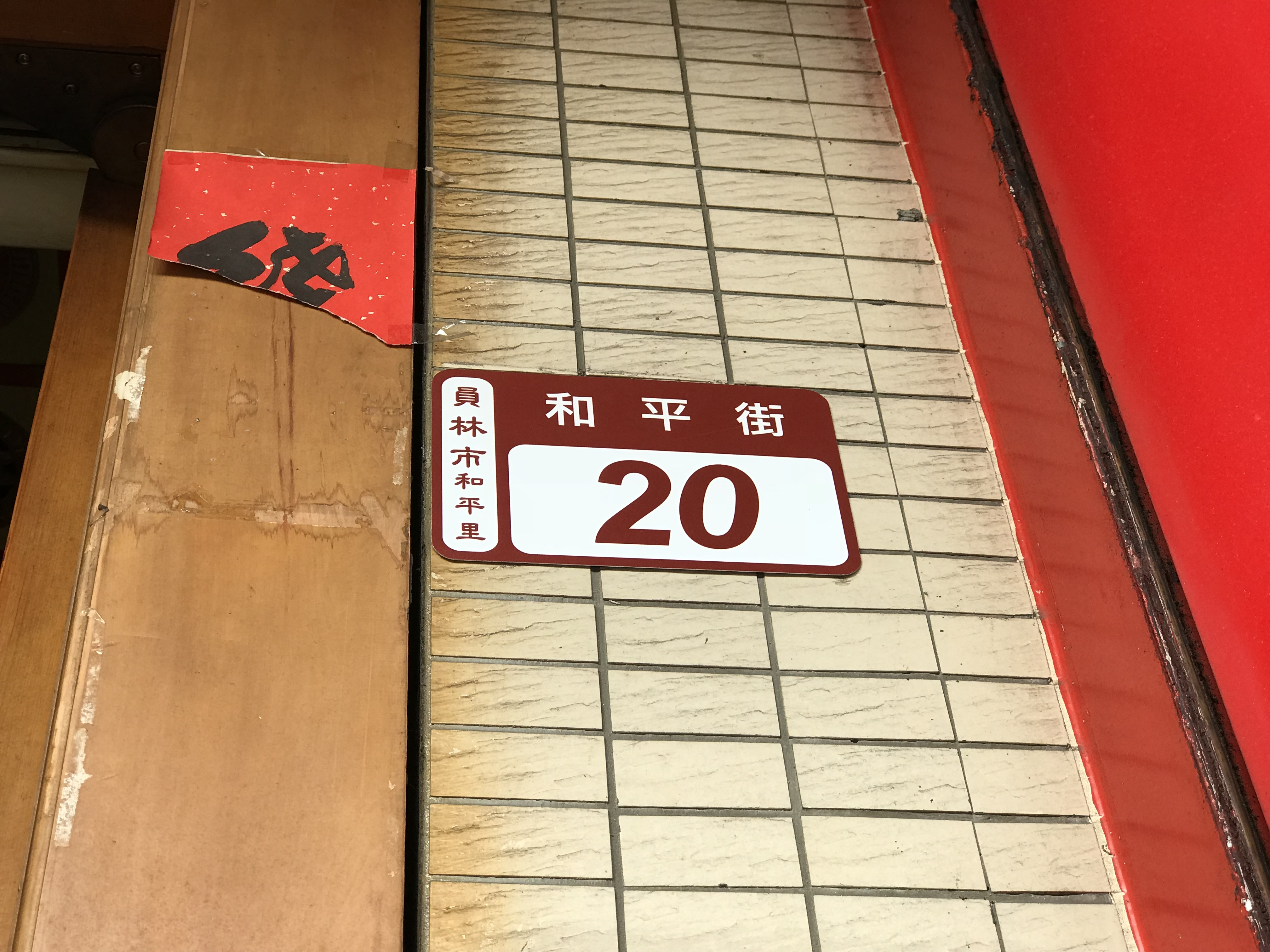 中文（台灣）: 員林禪寺門牌